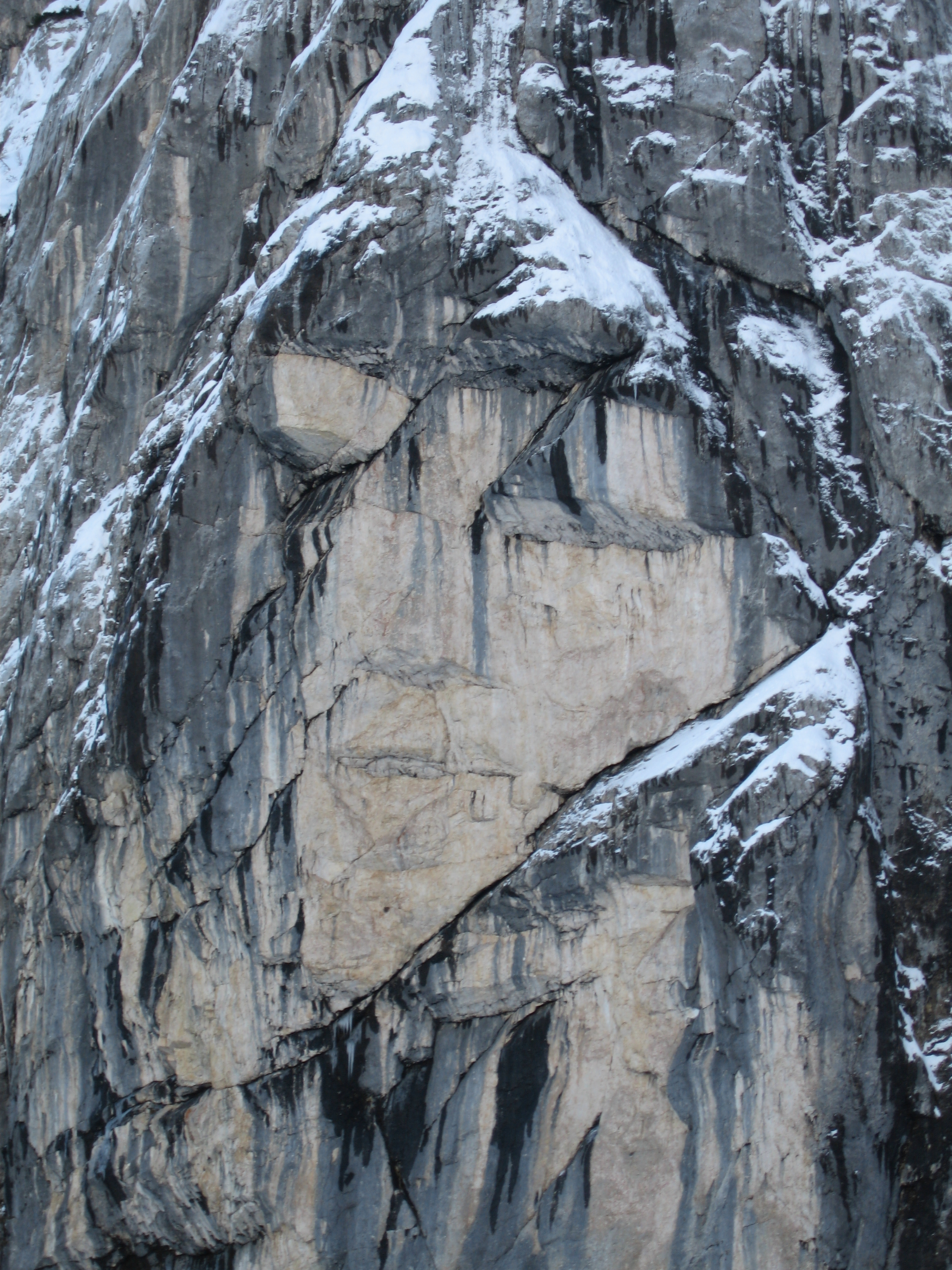 Ajdovska deklica, Slovenia